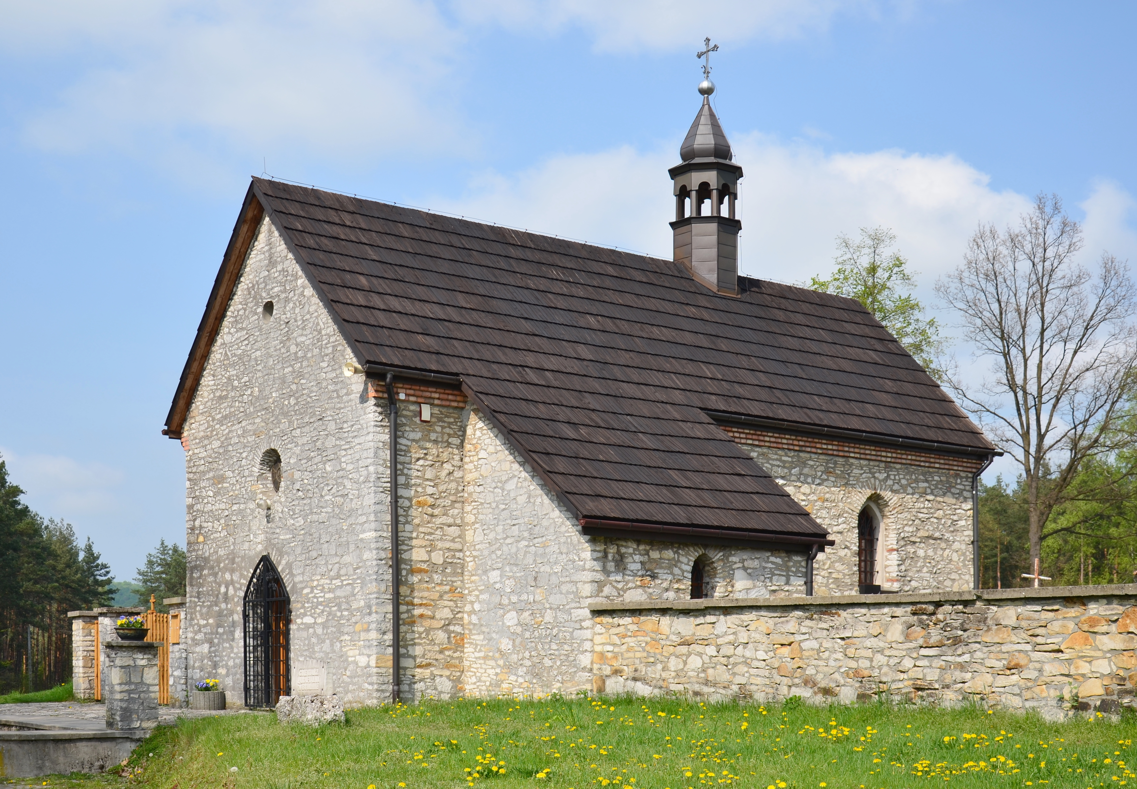 Kaplica na cmentarzu parafialnym w Bydlinie